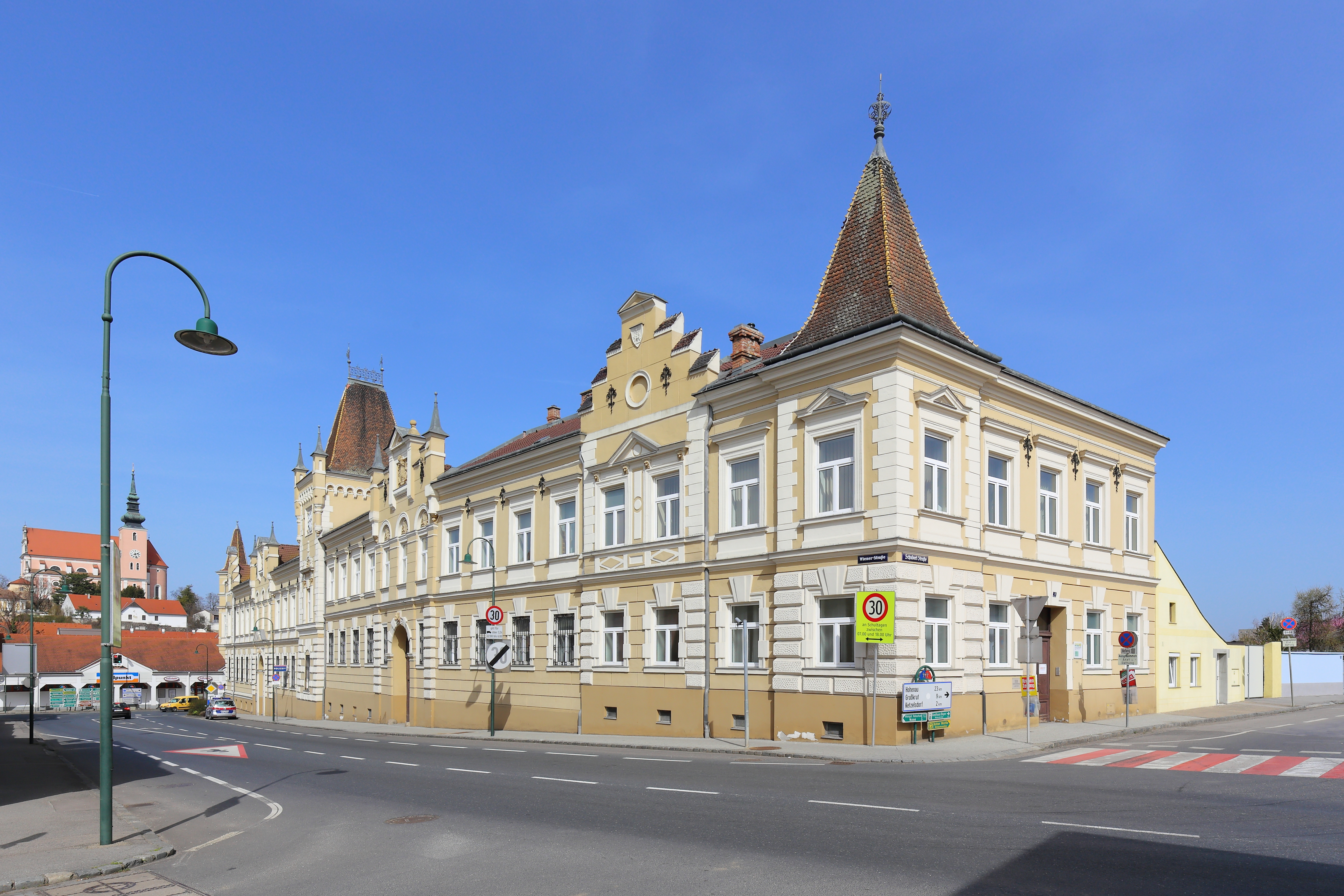 Ehemaliges Gerichts- und Amtsgebäude in der niederösterreichischen Stadt Poysdorf. Das Gebäude wurde nach Plänen von Eugen Sehnal 1897 errichtet.